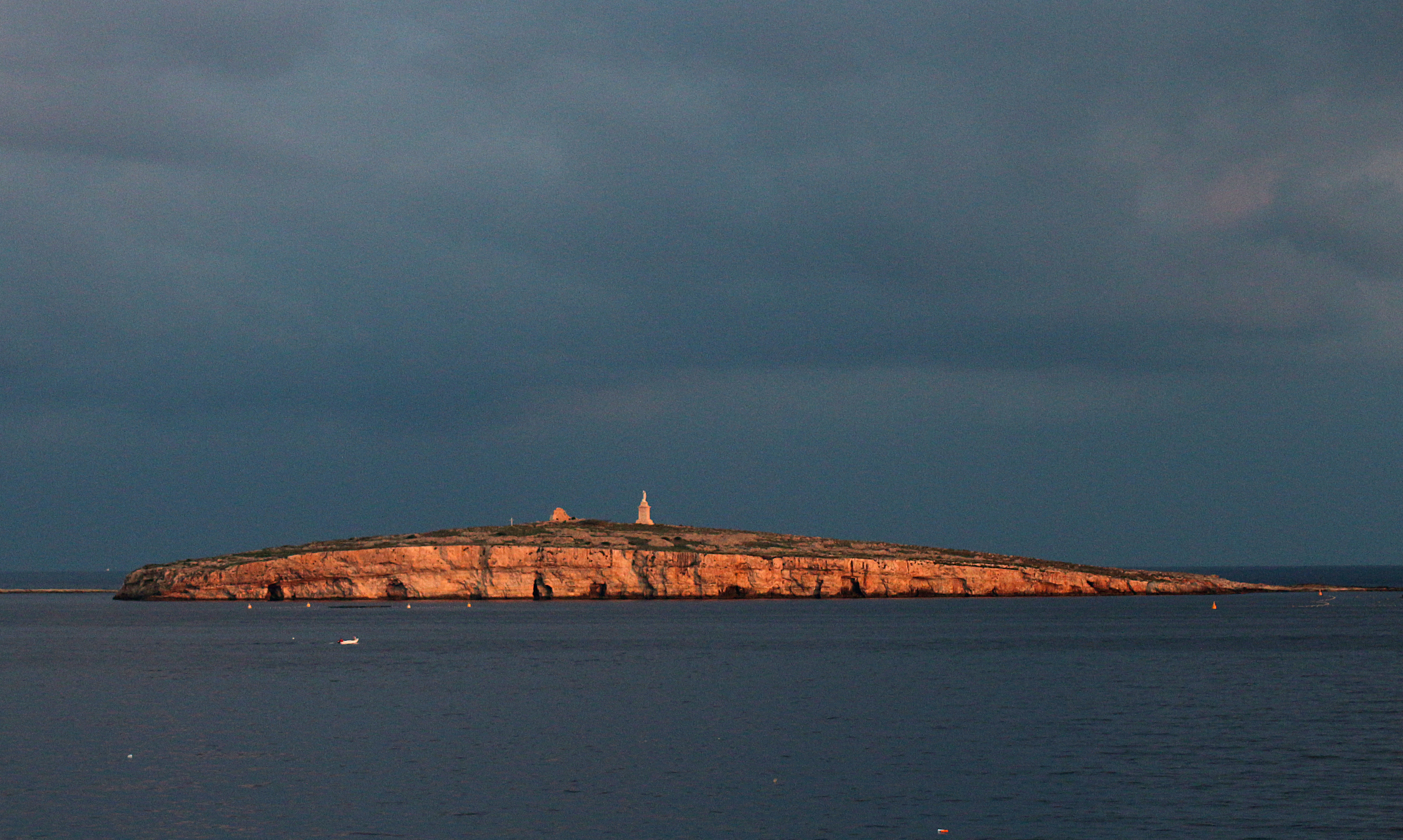 St Paul's Island, Malta.